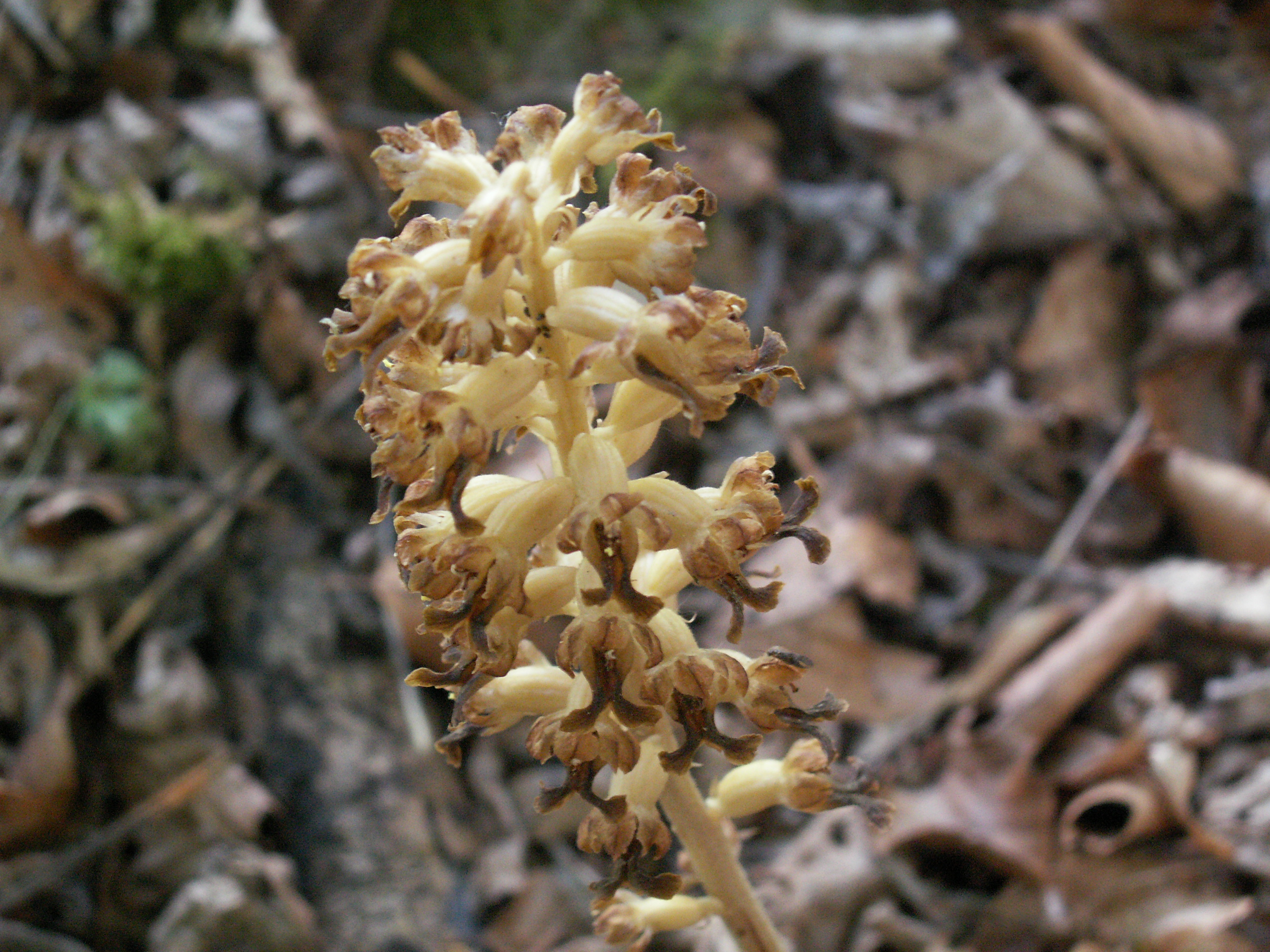 Néottie nid d'oiseau (Neottia nidus-avis) : la toubière du Peuil - France (38) Photo prise par Stéphane TASSON Date: Juin 2006